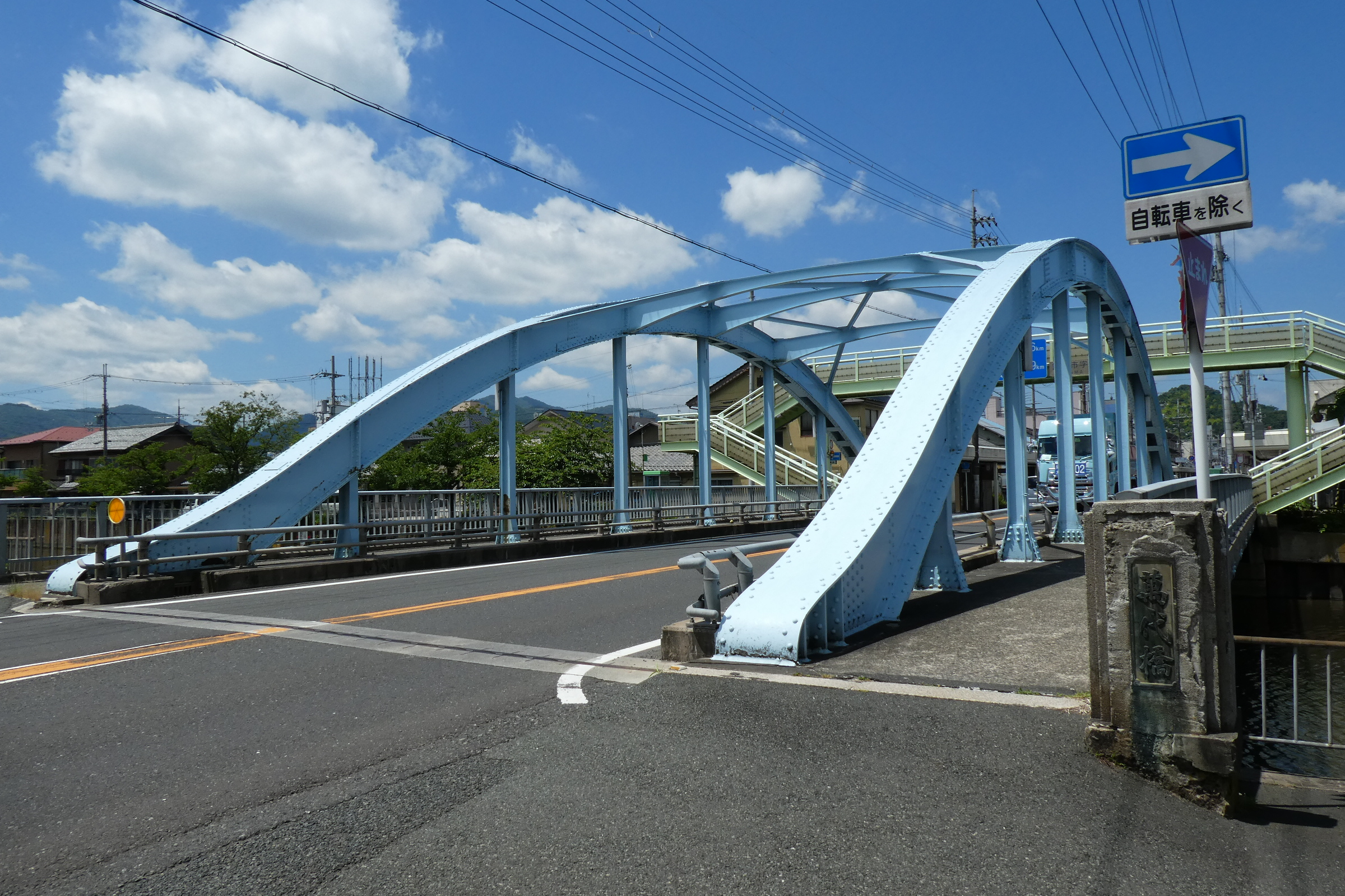 京都府舞鶴市の与保呂川に架かる万代橋（国道27号）。